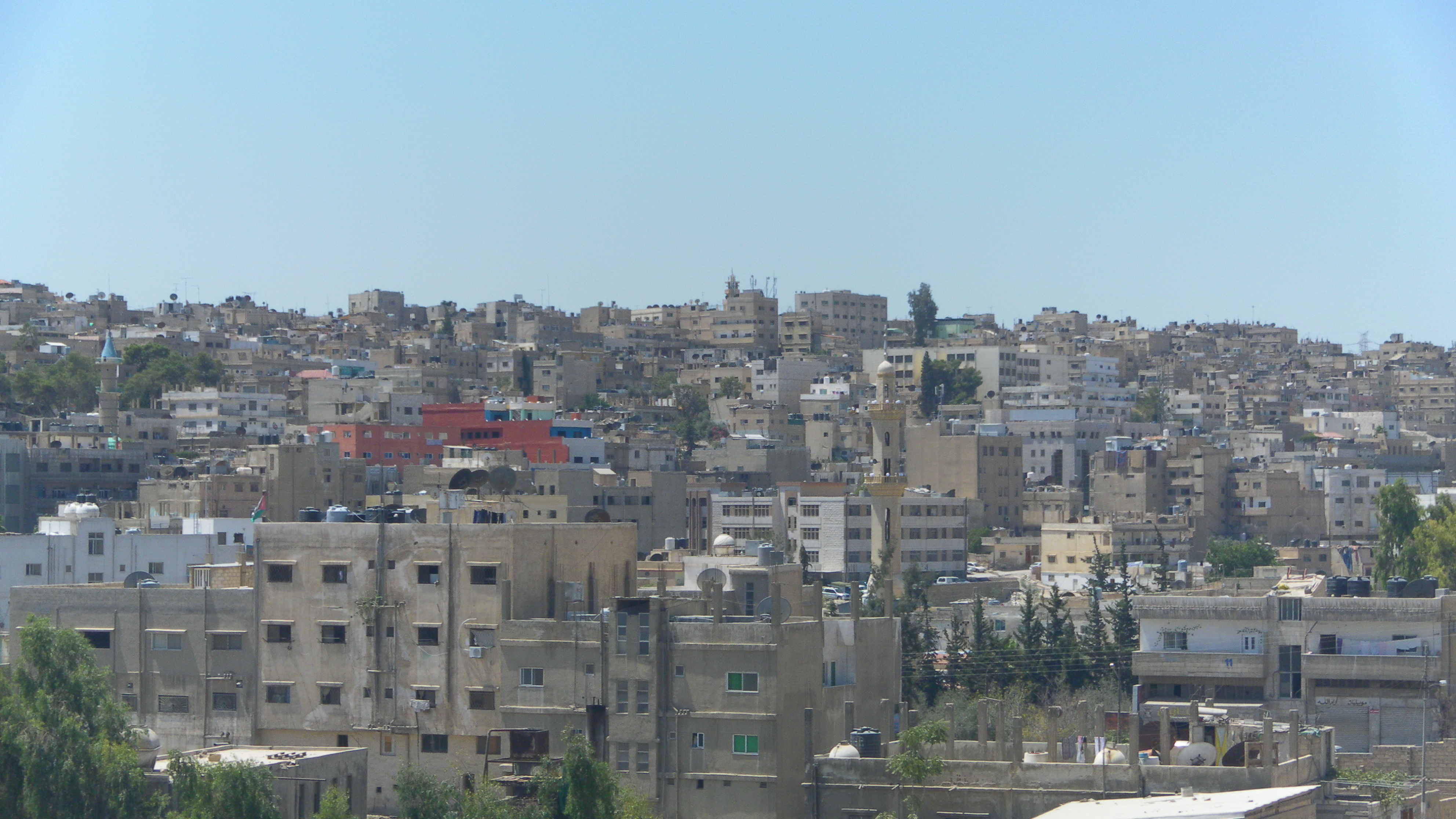 منظر من الجبل الجنوبي في الرصيفة, الزرقاء، الأردن